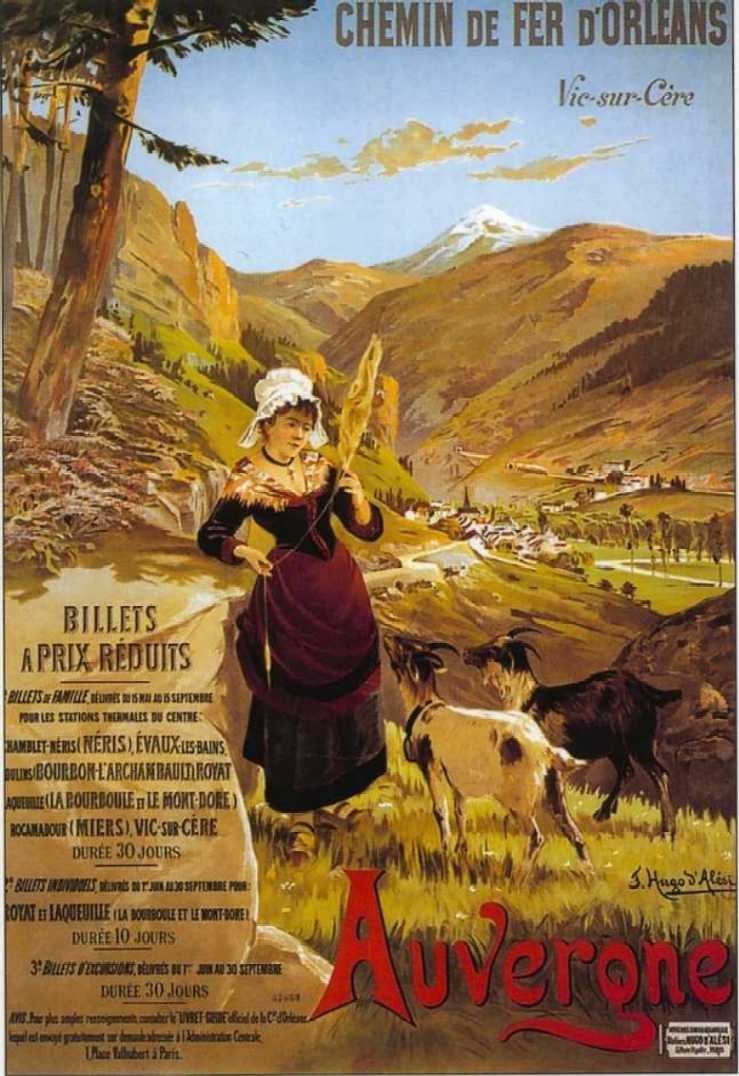 Affiche publicitaire touristique de la compagnie des chemins de fer d'Orléans, Vic-sur-Cère.